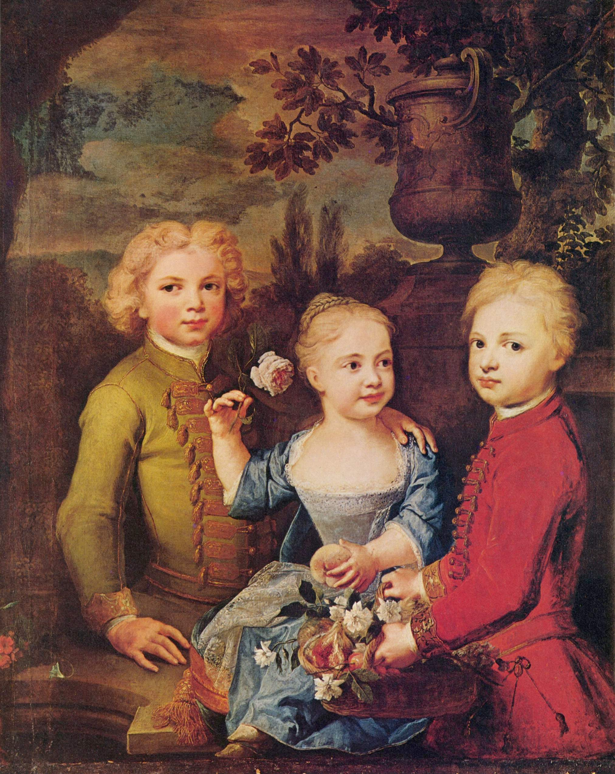 Porträt